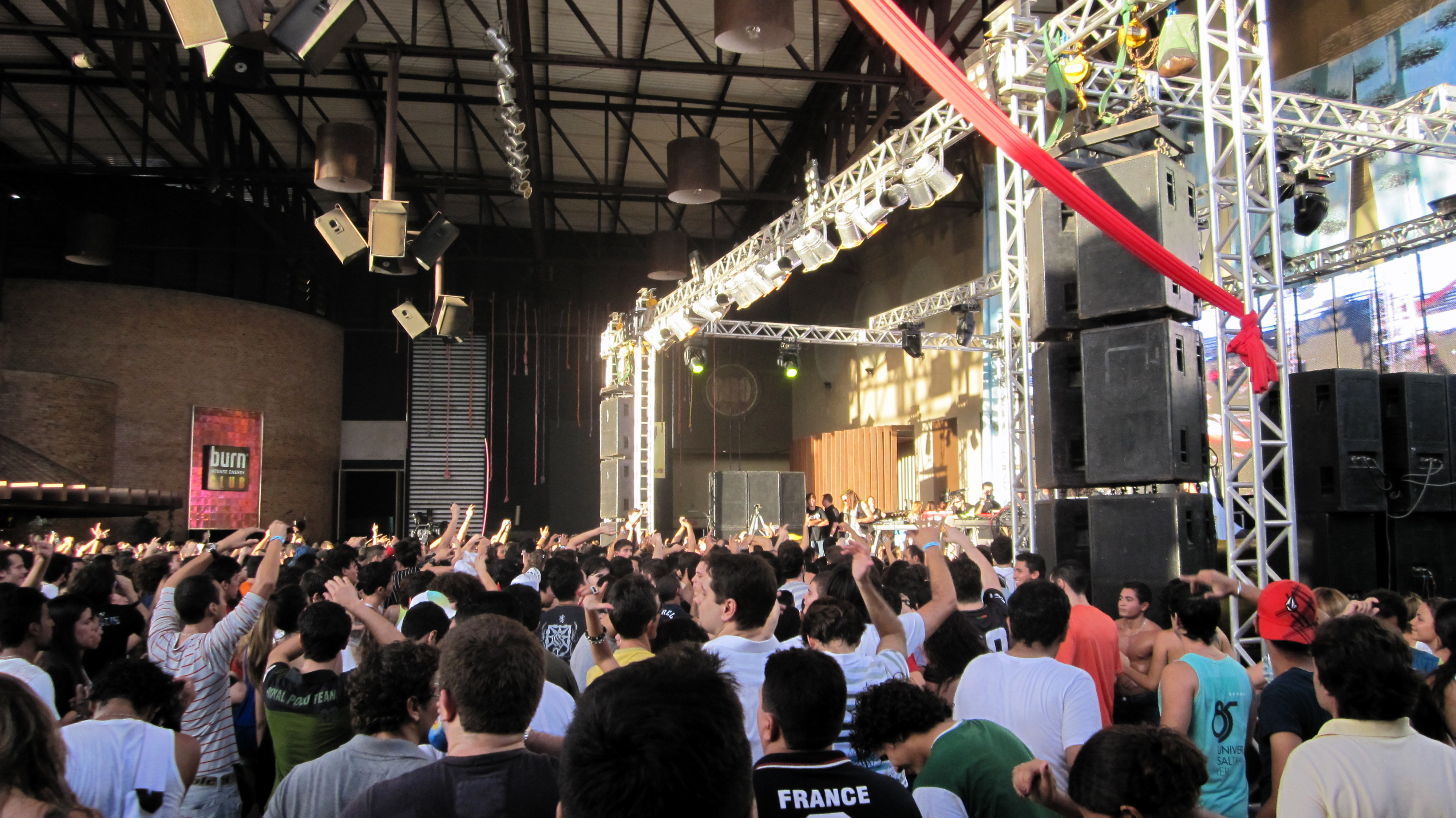 despedida do silvim